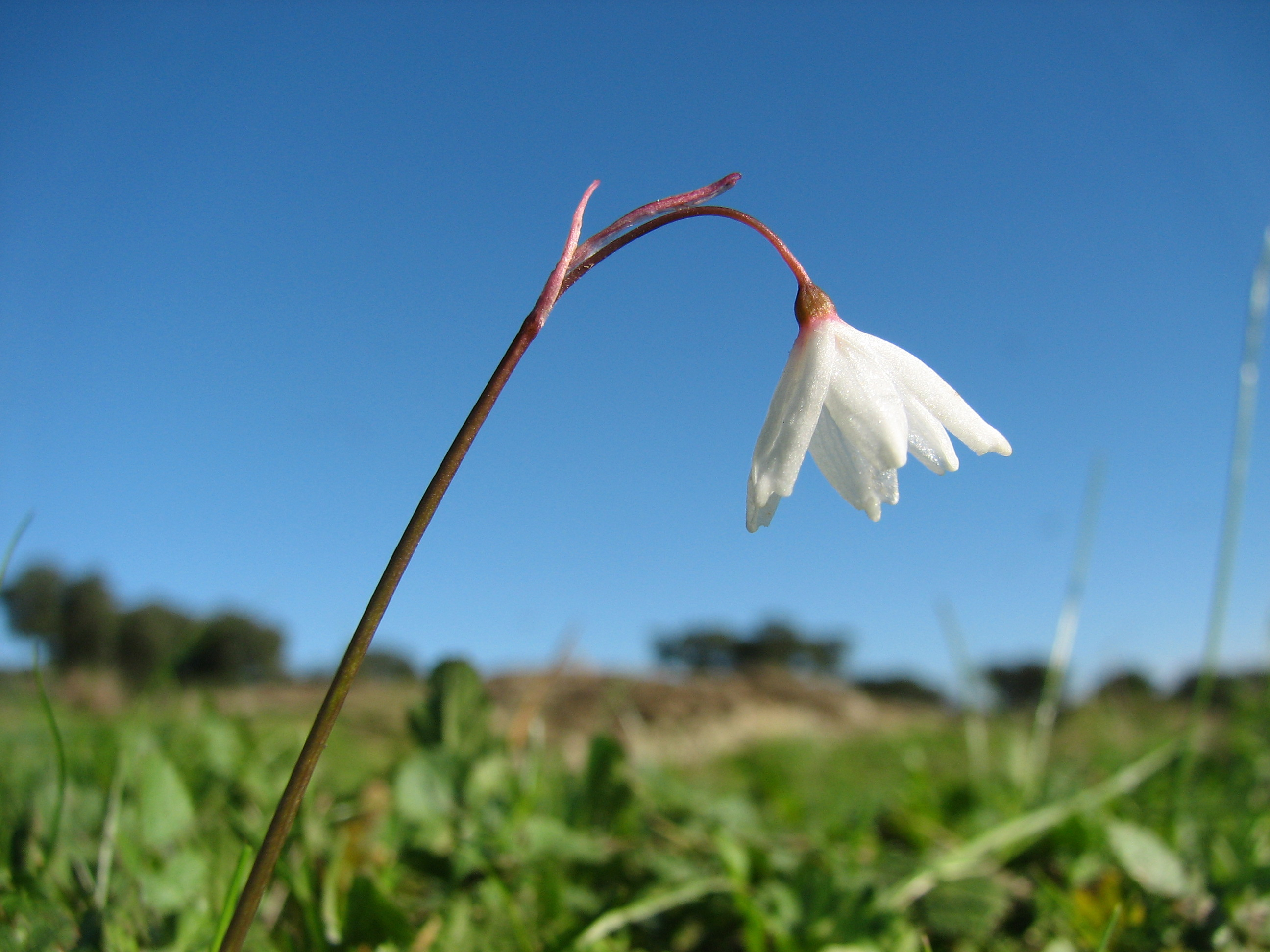 Caught at Alburquerque (Badajoz, Spain) close to Albarragena river. Acis autumnalis